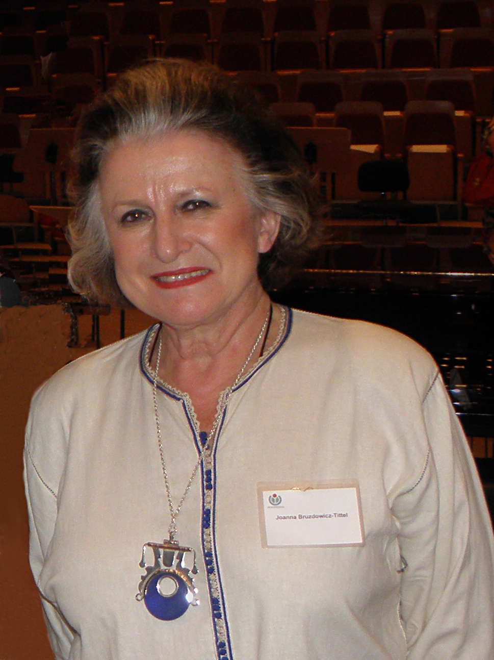 Joanna Bruzdowicz at Wikimania Gdansk 2010